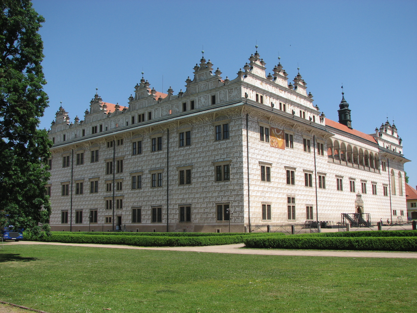 Zámek Litomyšl, Jiráskovo náměstí, Jiráskova 93.